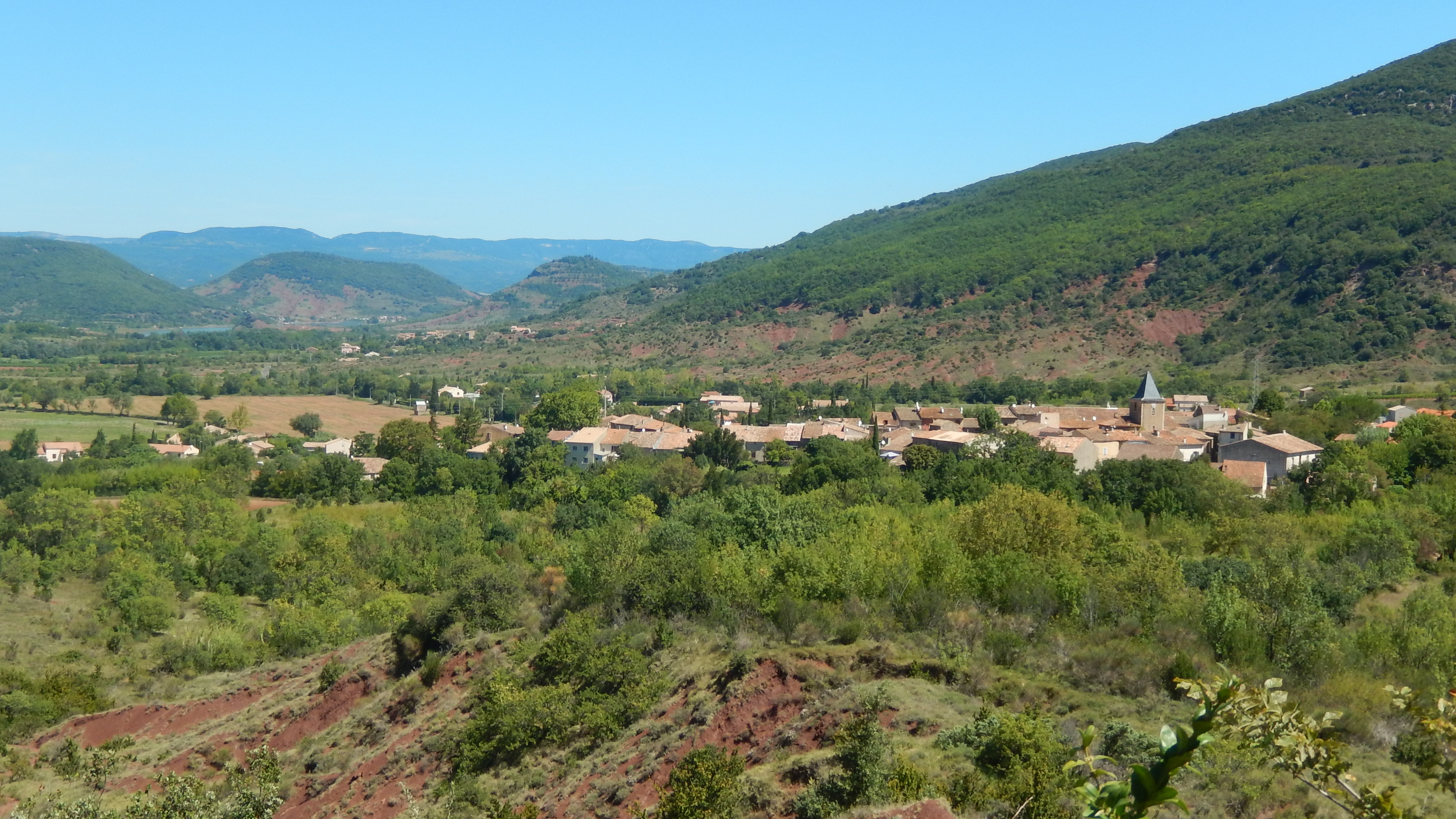 Le village de Salasc (Hérault, France) vu depuis le sentier des béals, qui traverse des hauteurs situées au sud-ouest. Au premier plan, des ruffes, caractéristiques des sols de la région. Au fond, on aperçoit le lac du Salagou. (La géolocalisation de cette image est approximative.)